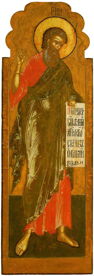 Праотец Енох. Праотеческий чин из главного иконостаса ц. Иоанна Златоуста в Коровниках в Ярославле